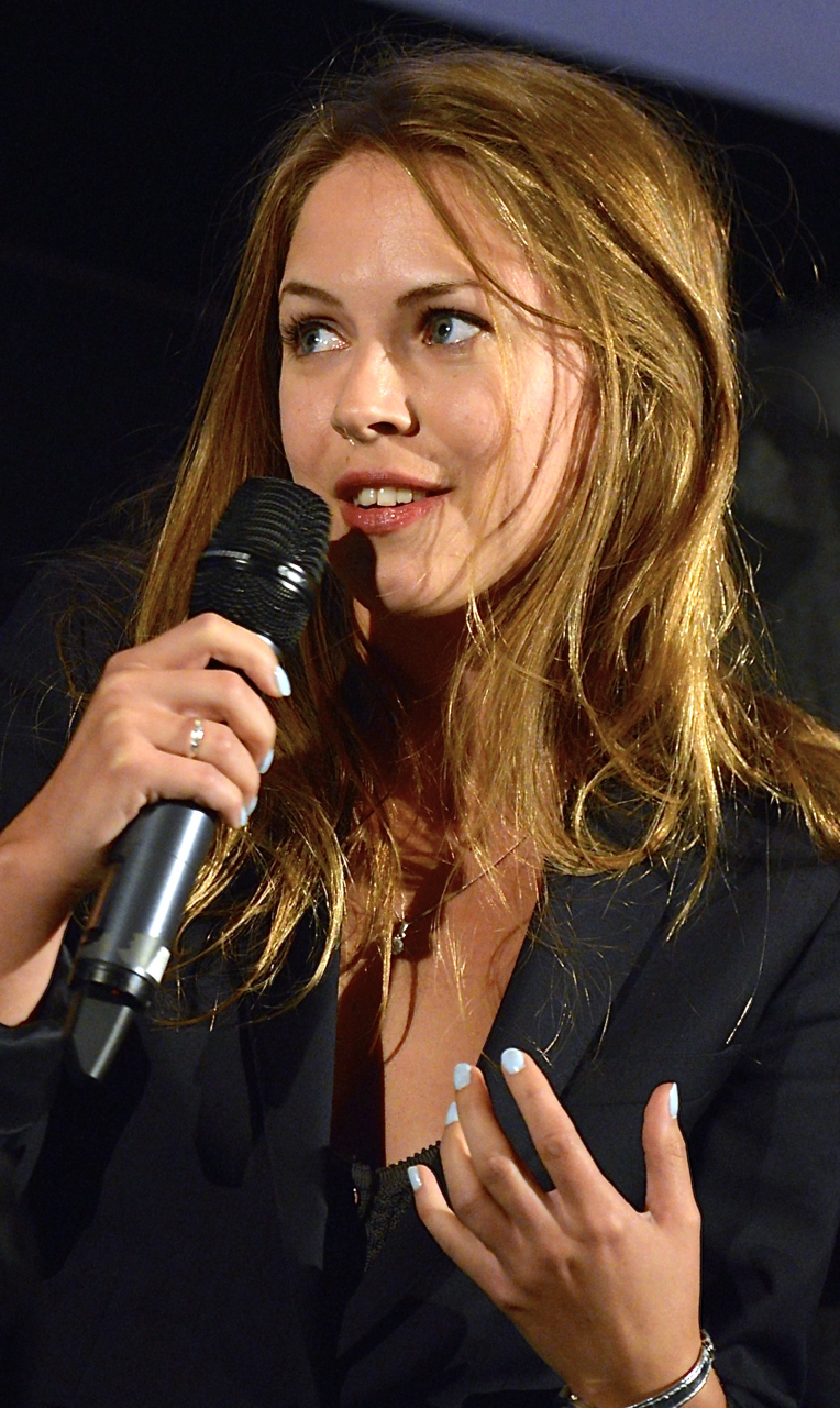 Alexandra Dahlström under presentationen av All We Have Is Now i Filmhuset i Stockholm den 18 augusti 2014.